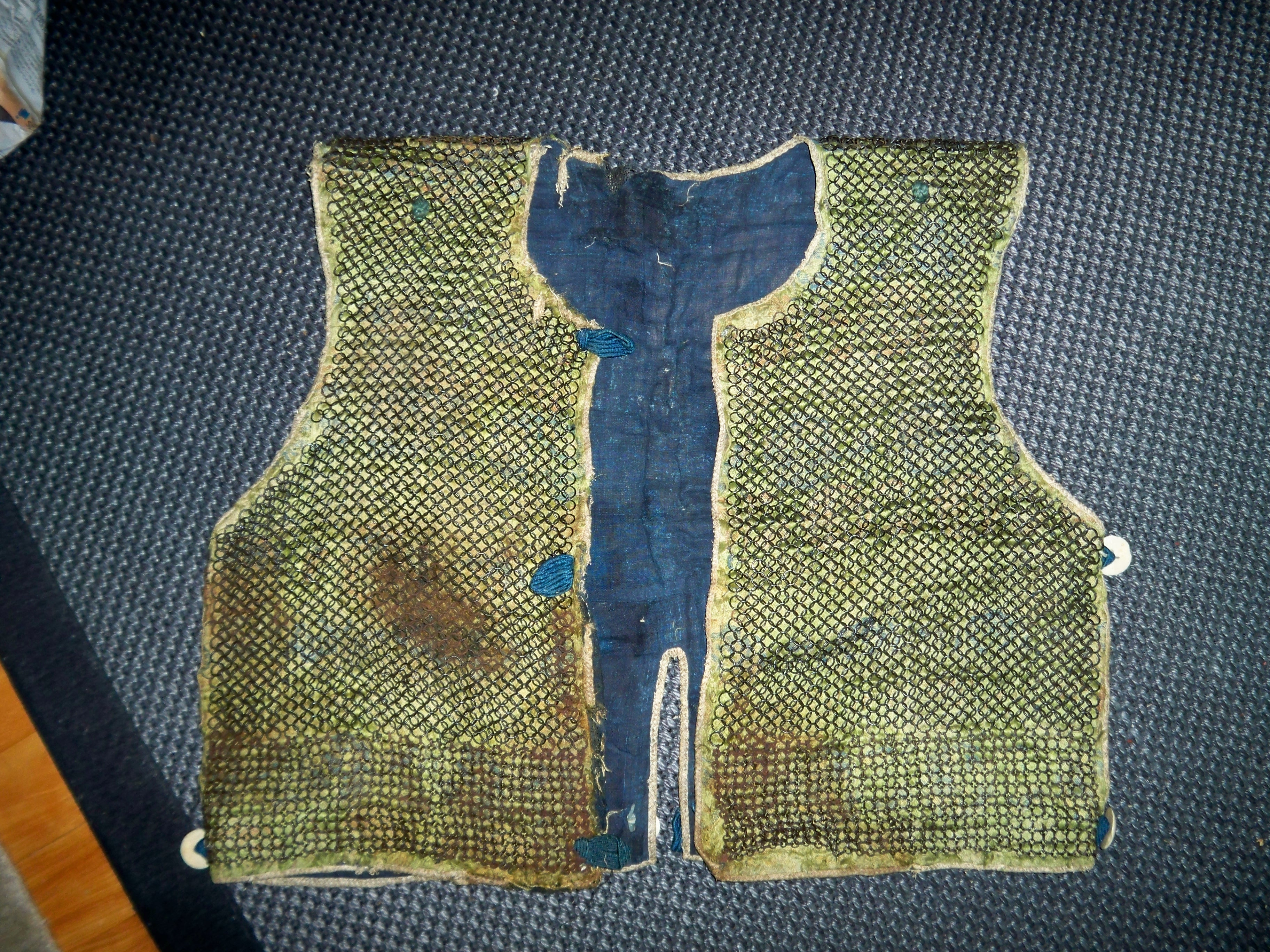 Japanese (samurai) Edo period chain vest "kusari Manchira"